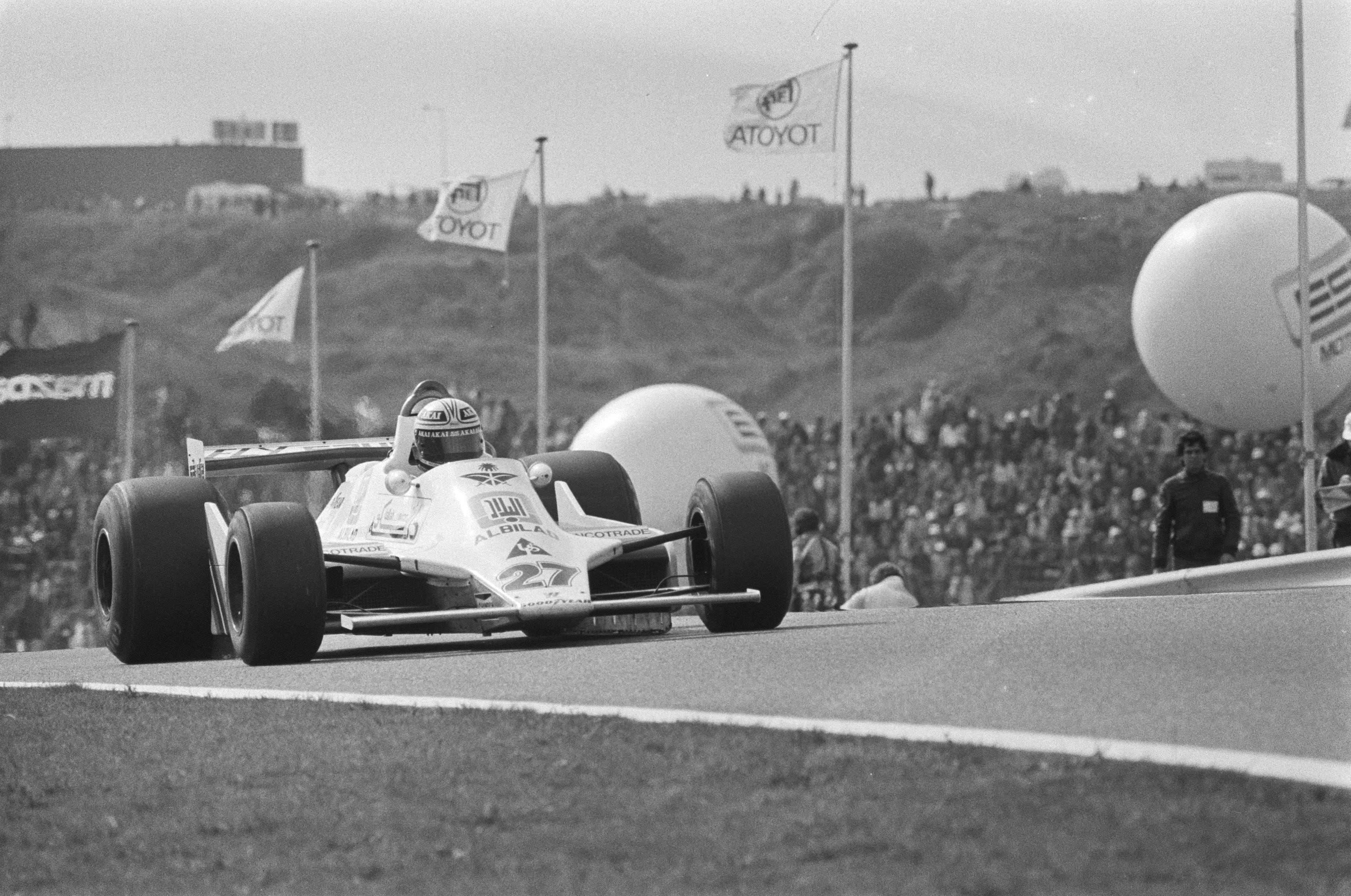 Winnaar Alan Jones in aktie.